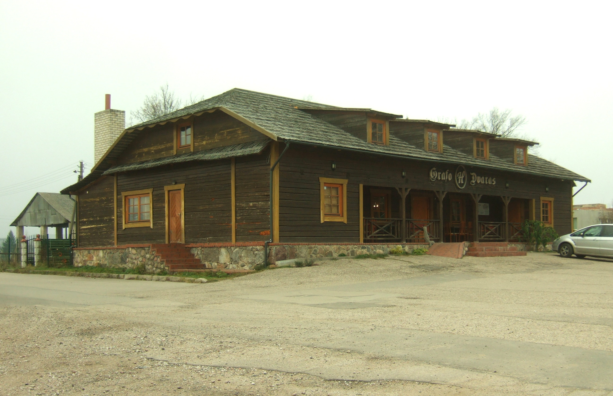 Maišiagalos dvaro svirnas